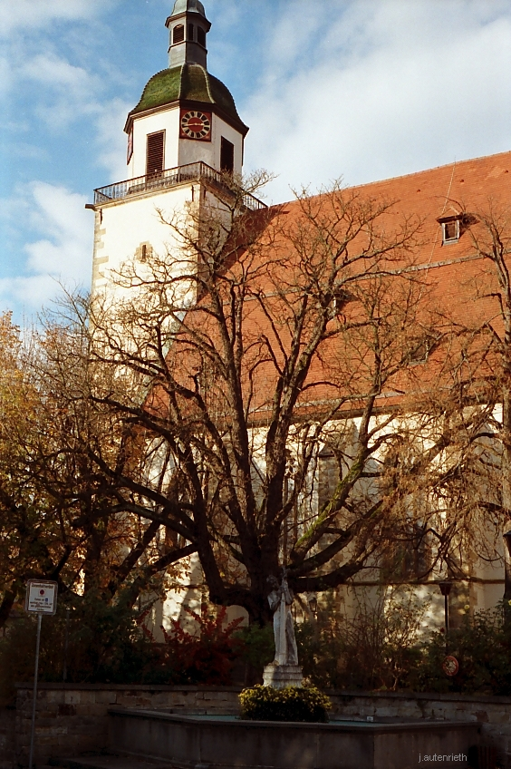 (Turm der Martinskirche), Weilheim an der Teck